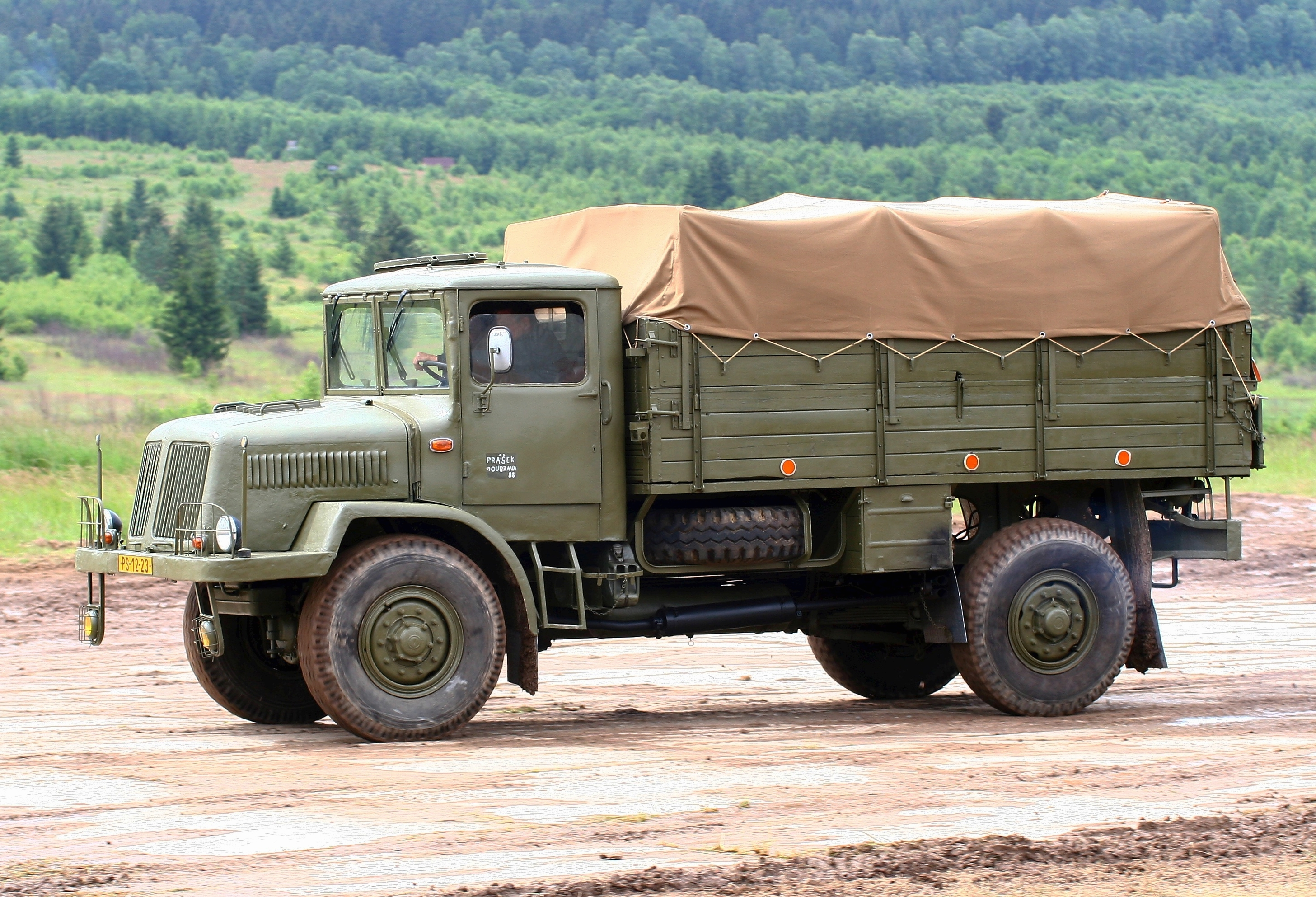 Vojenská technika zaznamenaná při dynamických ukázkách na Dni pozemního vojska BAHNA 2018, který pořádá Velitel společných sil a Nadace pozemního vojska AČR.